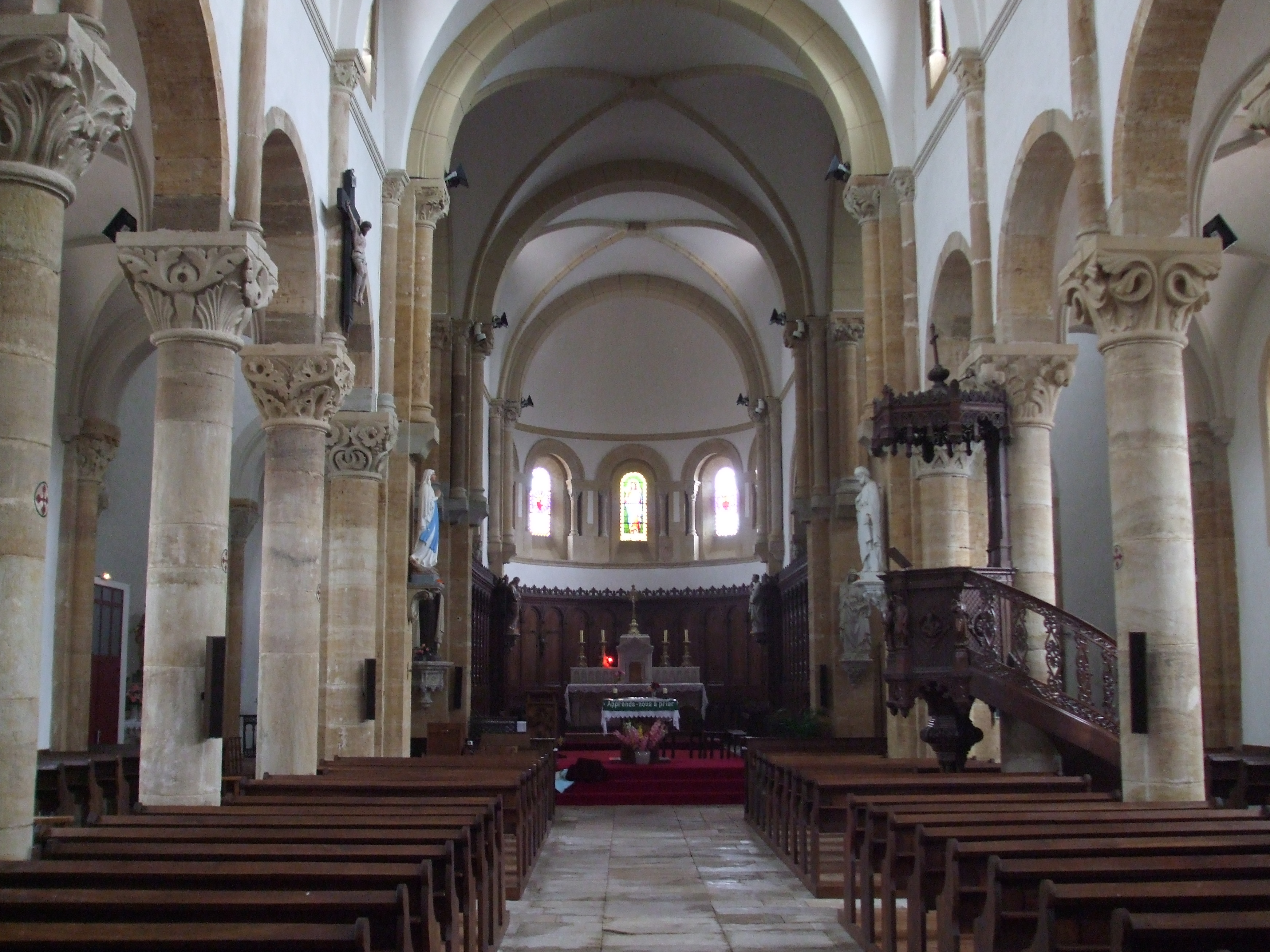 Eglise de Gibles, Saône et Loire, Bourgogne, France